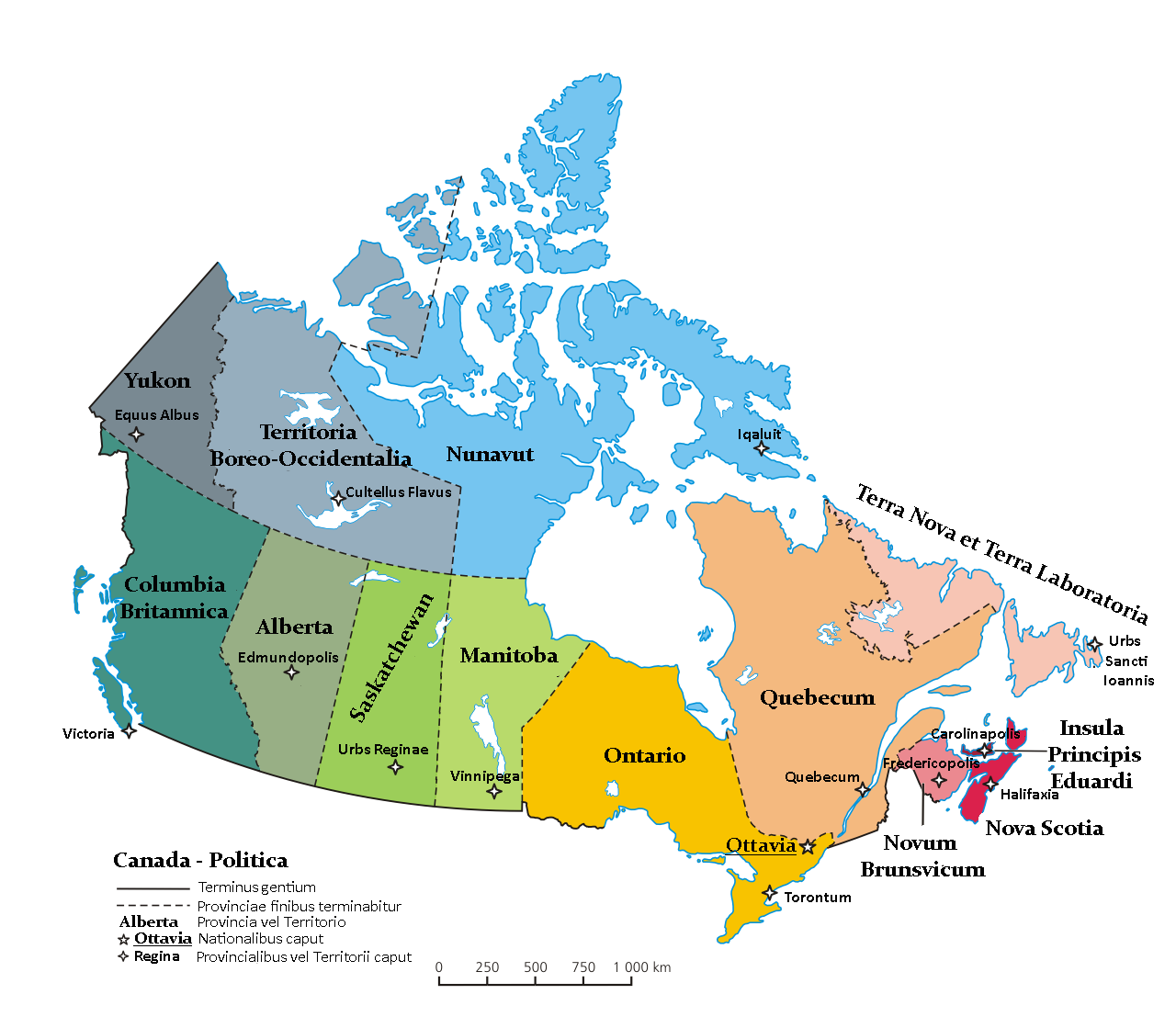 A map of Canadian provinces/territories with capitals in Latin language.